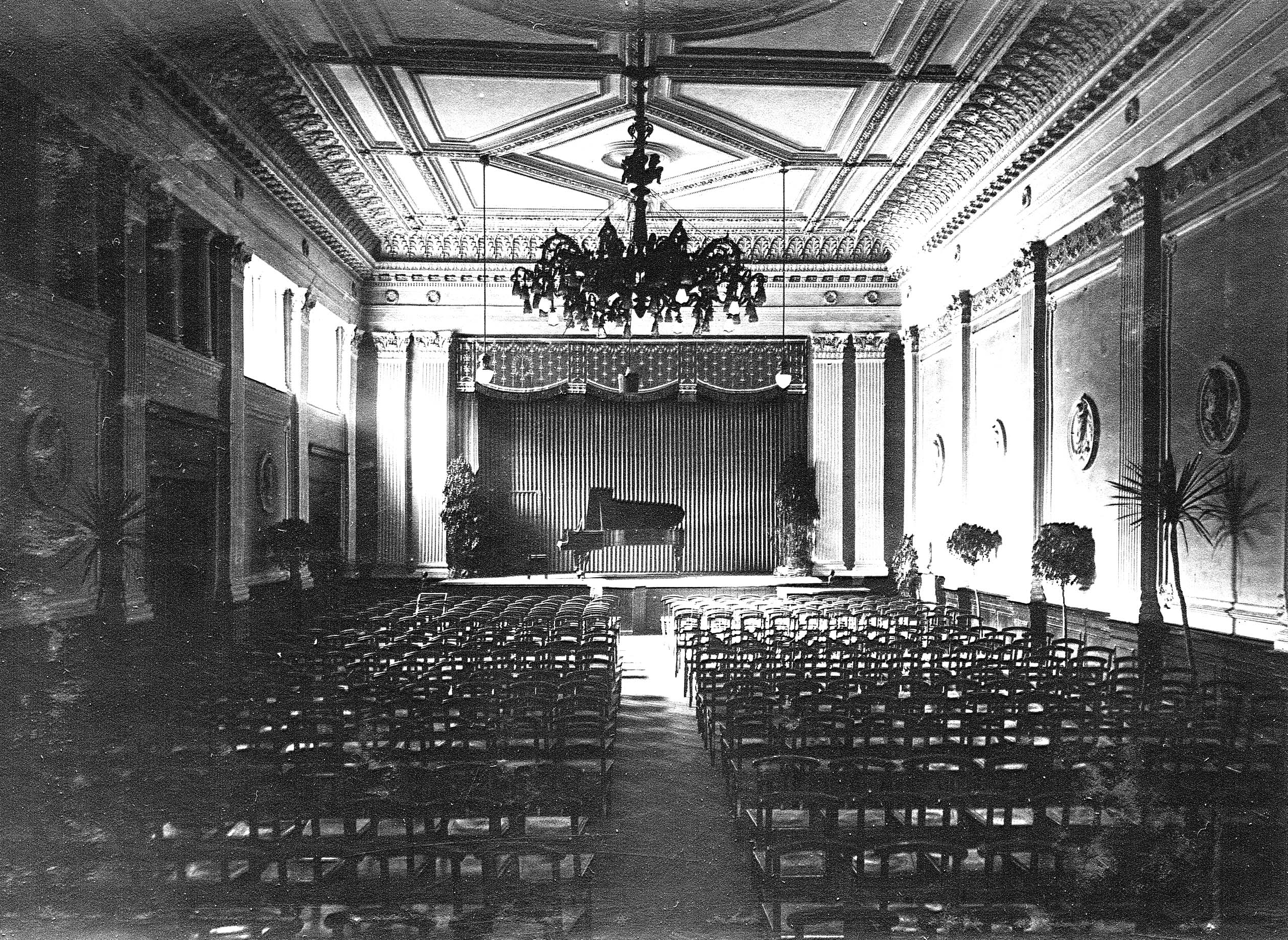 Ehemalige Concerthall der Firma Grotrian-Steinweg